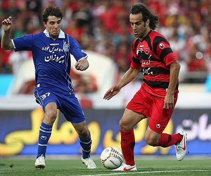 علی کریمی و فابیو جانواریو - دربی تهران - پرسپولیس ۰ - استقلال ۰ - ۳ شهریور ۱۳۹۱